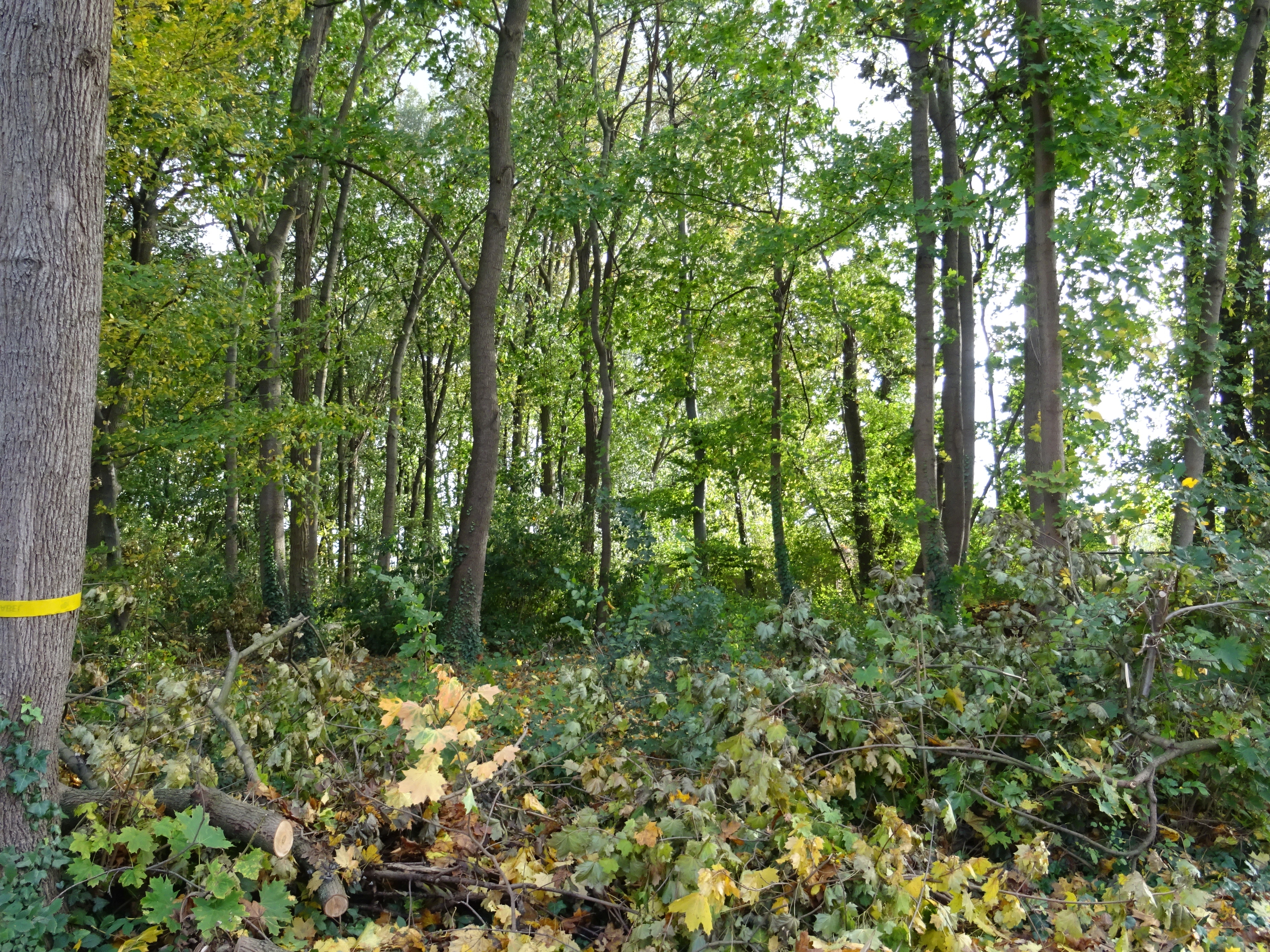 Teltow, denkmalgeschützter Villengarten ("Sabersky-Park") an der Lichterfelder Allee